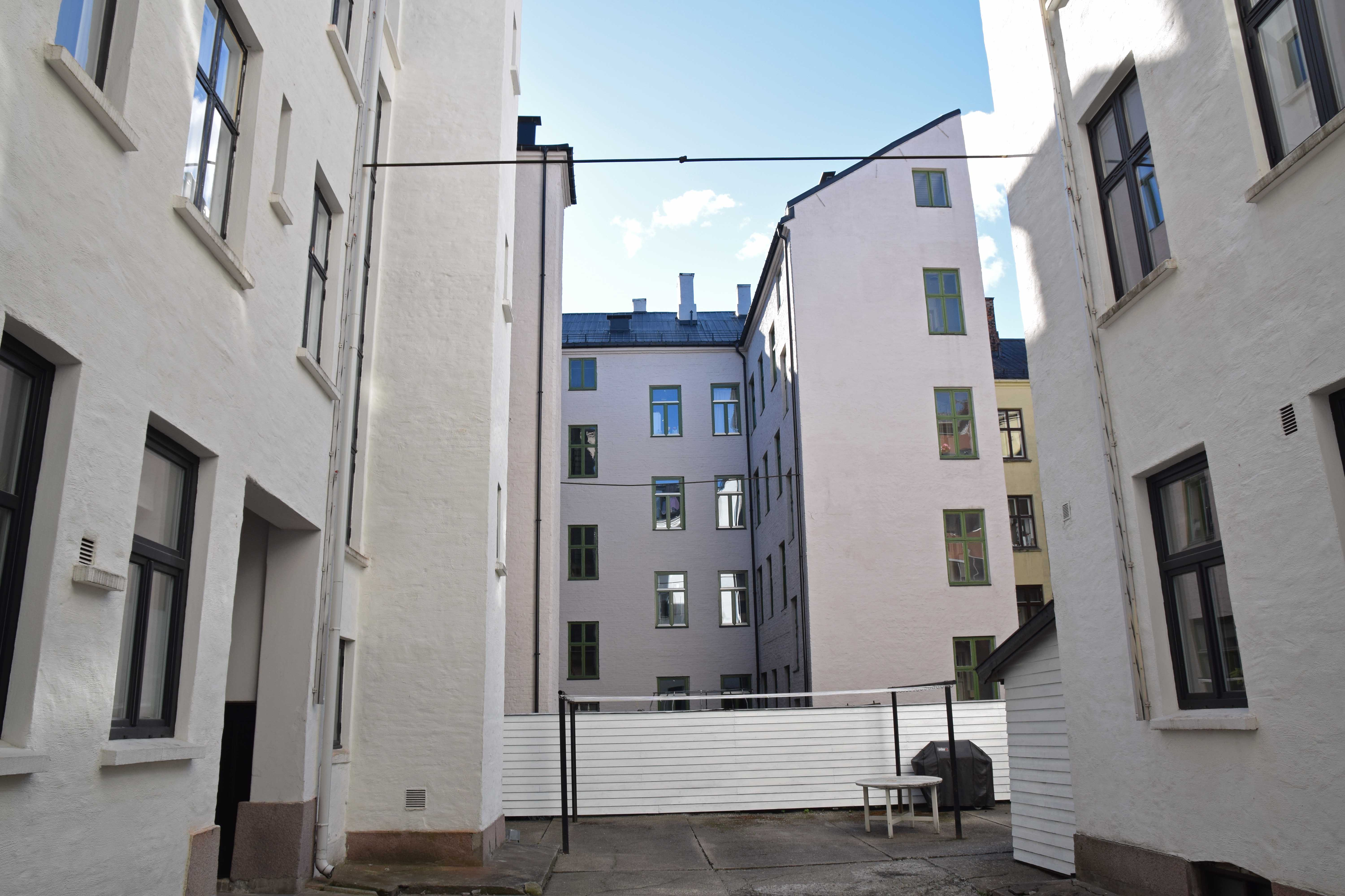 Gårdsrom i Frydenlundgata mellom Benneches gate og Krafts gate. Frydenlundgata nr. 8 ligger mot gaten, nr. 8C nærmest til høyre er bakgård. Midt i bildet ses 6C, som er en L-gård, leiegård i vinkel, her med pulttak.